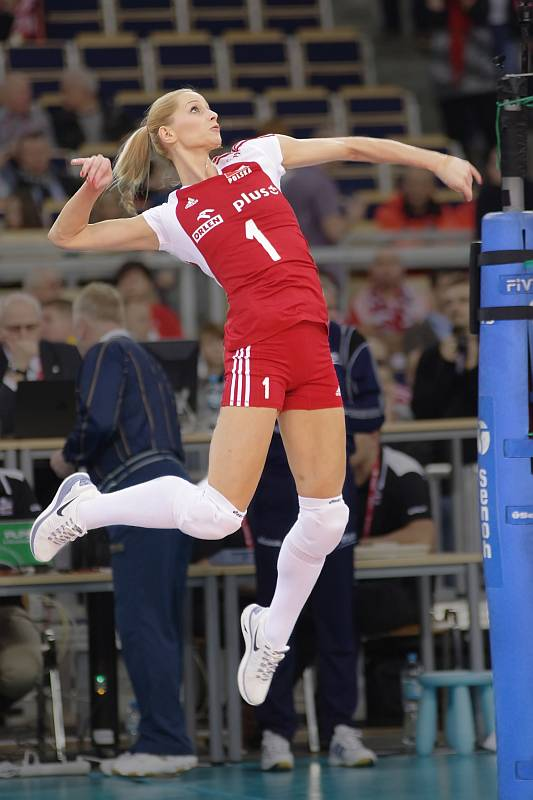 Polska - Hiszpania, Turniej Kwalifikacyjny do MŚ